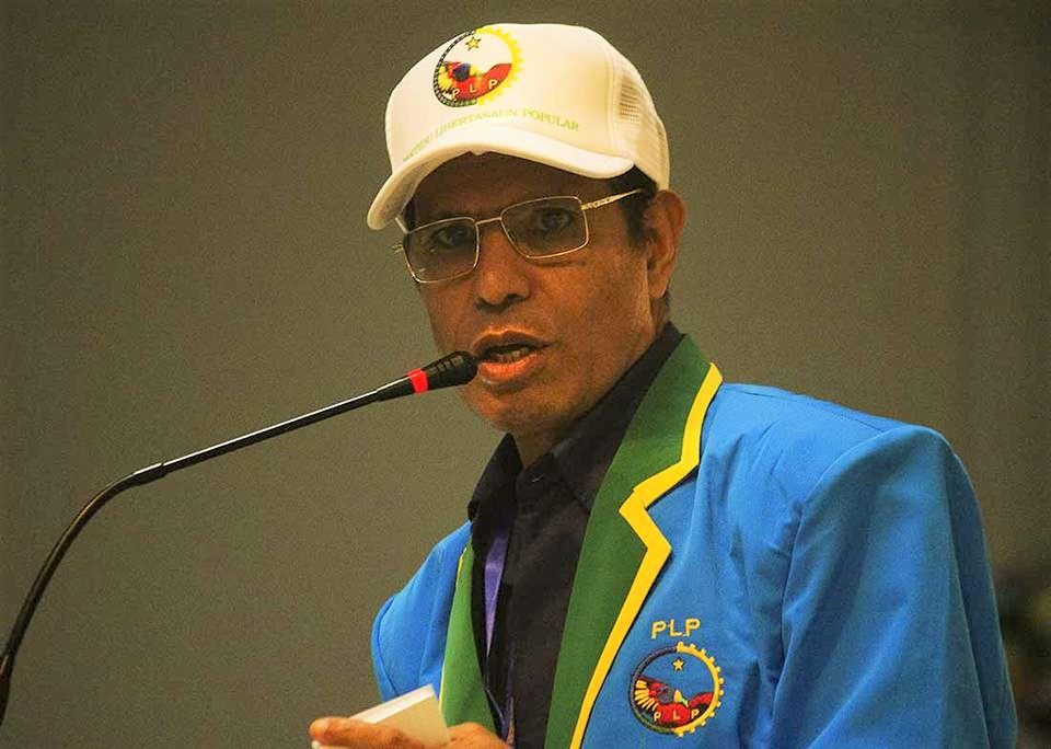 Taur Matan Ruak beim ersten Nationalkongress der PLP, wo er zum Parteivorsitzenden gewählt wurde